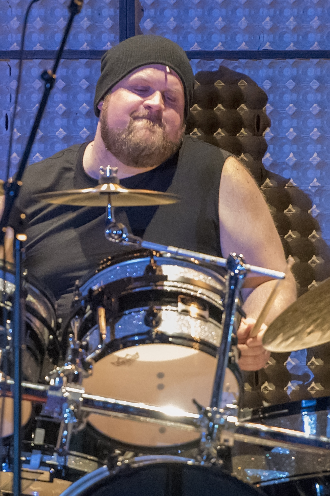 Bert Huysentruyt in actie